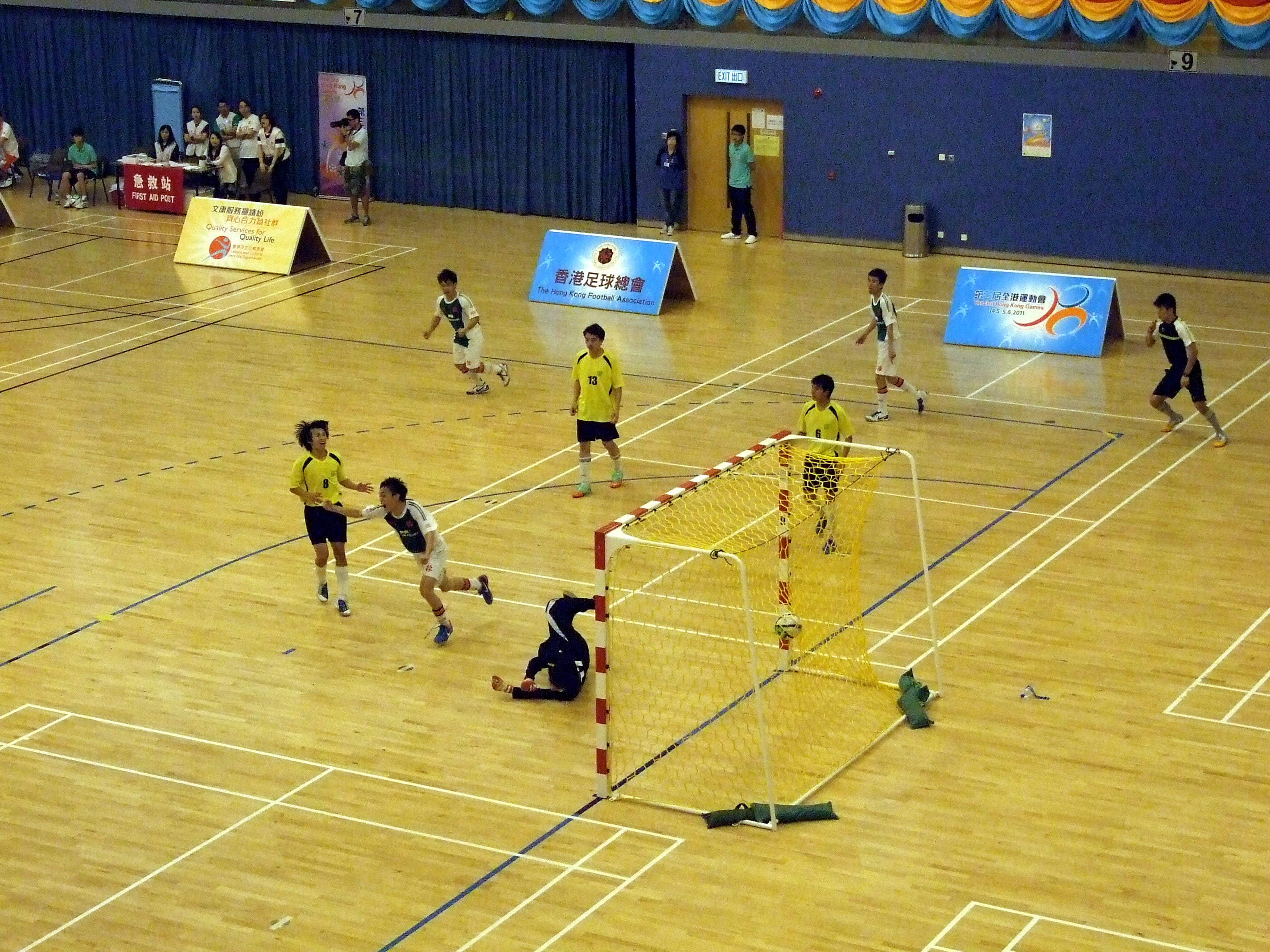 中文（香港）: 2011年全港運動會五人足球比賽決賽東區於完場前43秒射入的奠勝球